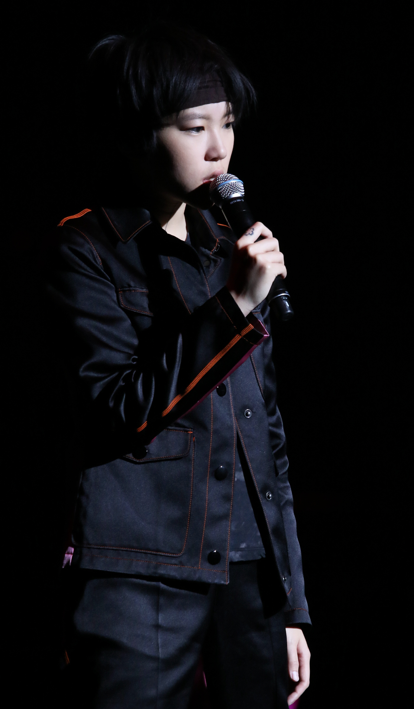 窦靖童 1203咪咕音乐盛典